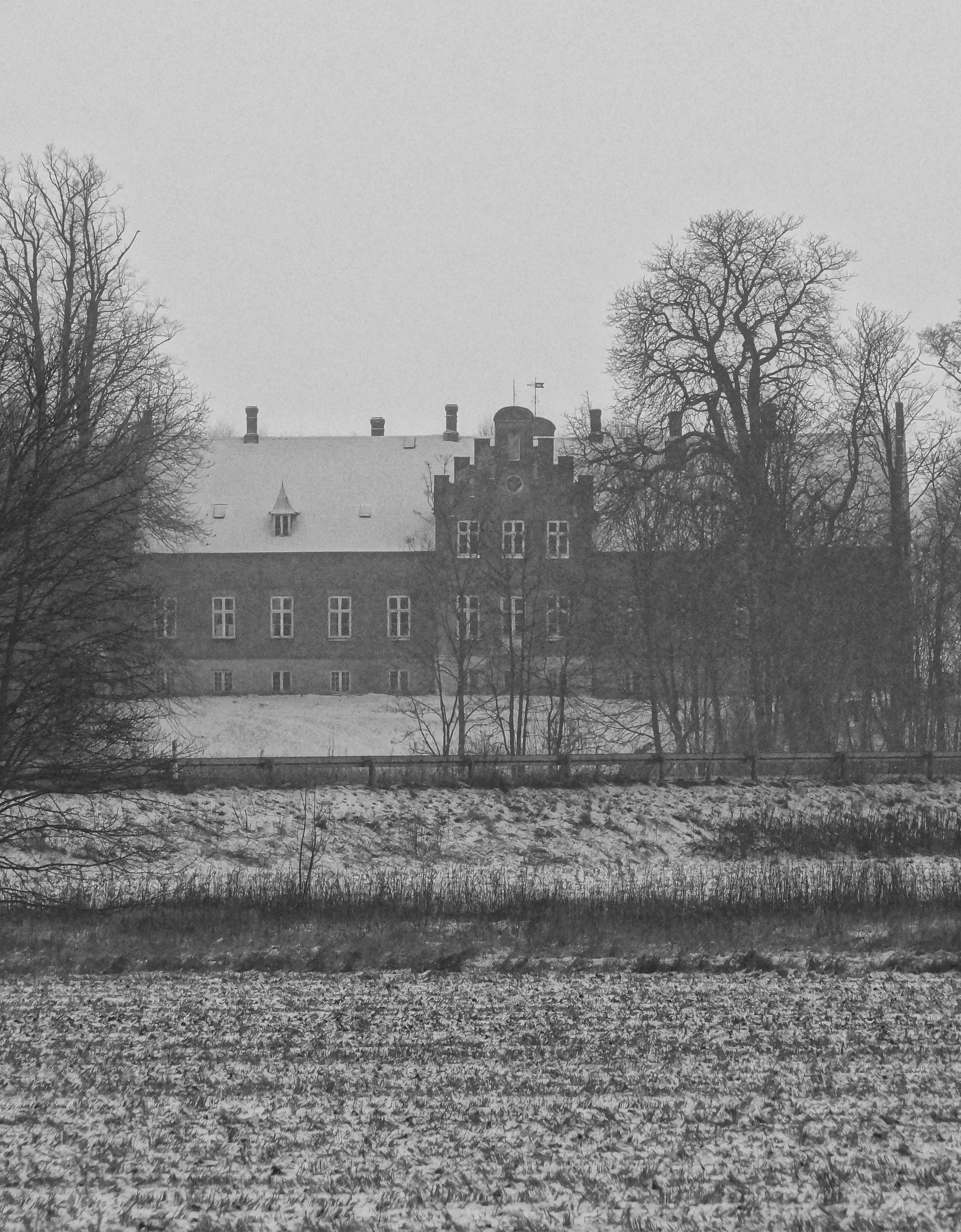 Høegholm Gods, Djursland